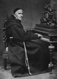 Pater Peter Singer, geborener Josef Anton Singer